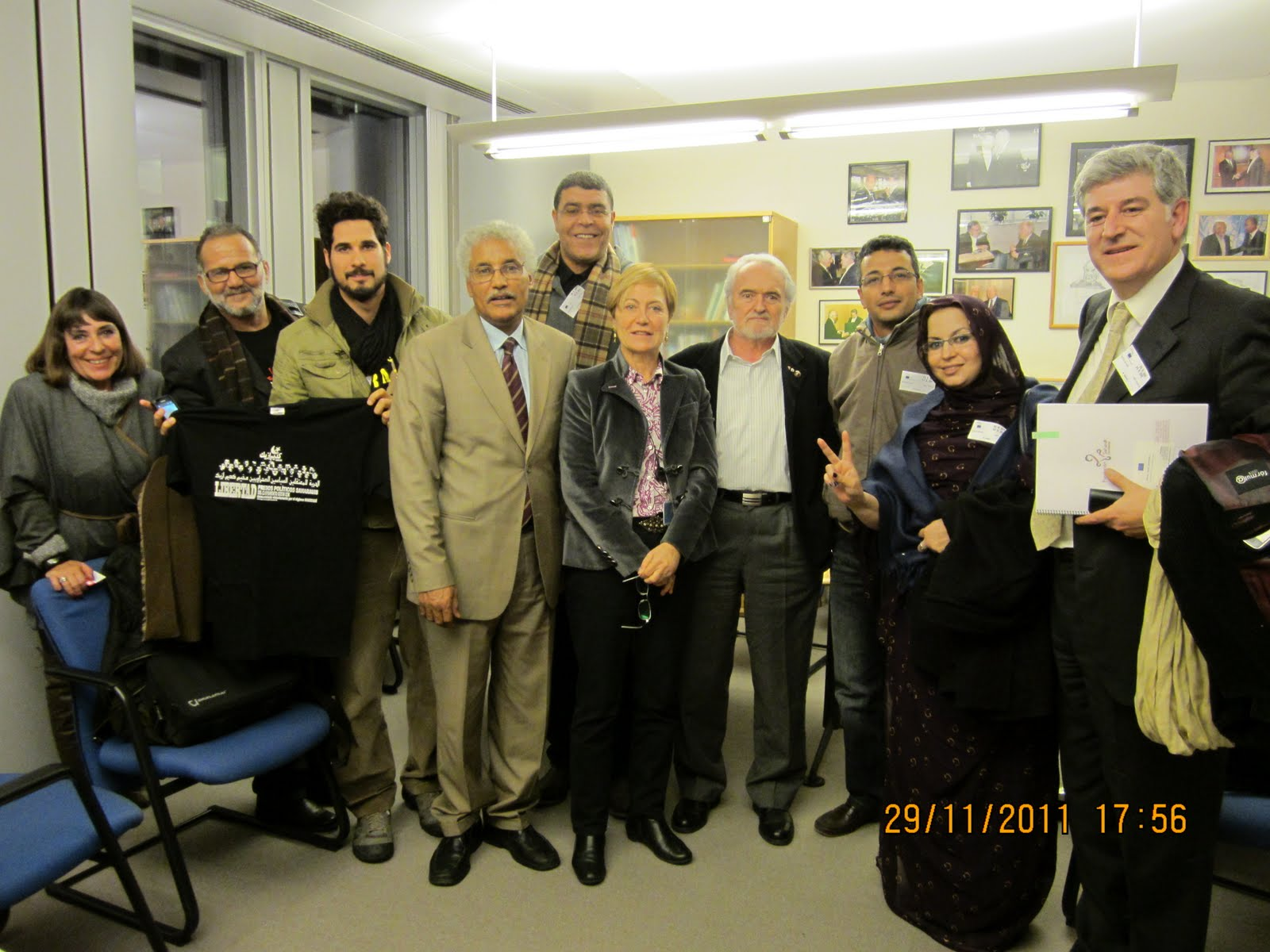 Parlamento Europeo